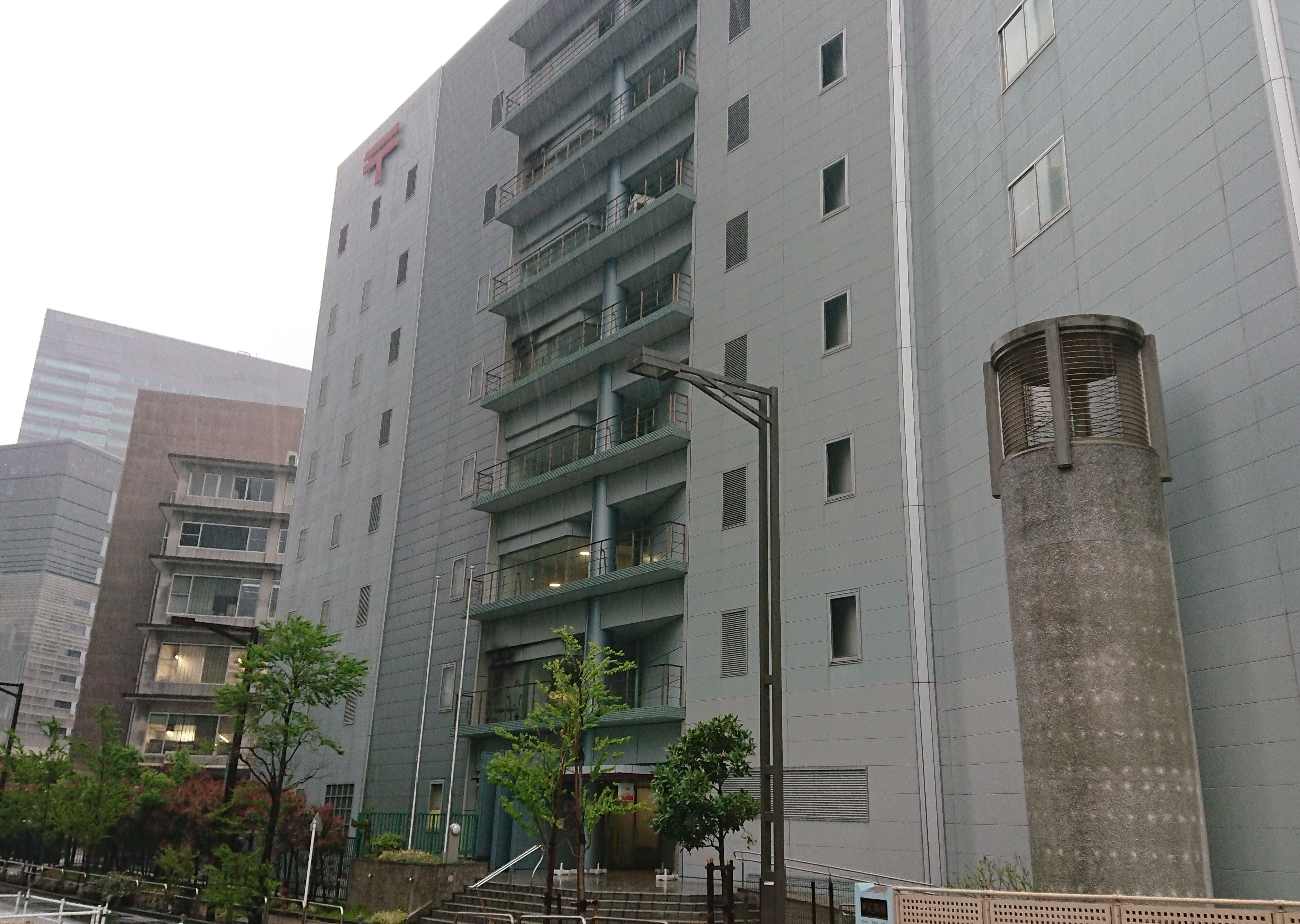 ゆうゆう窓口は正面とは別棟になります。